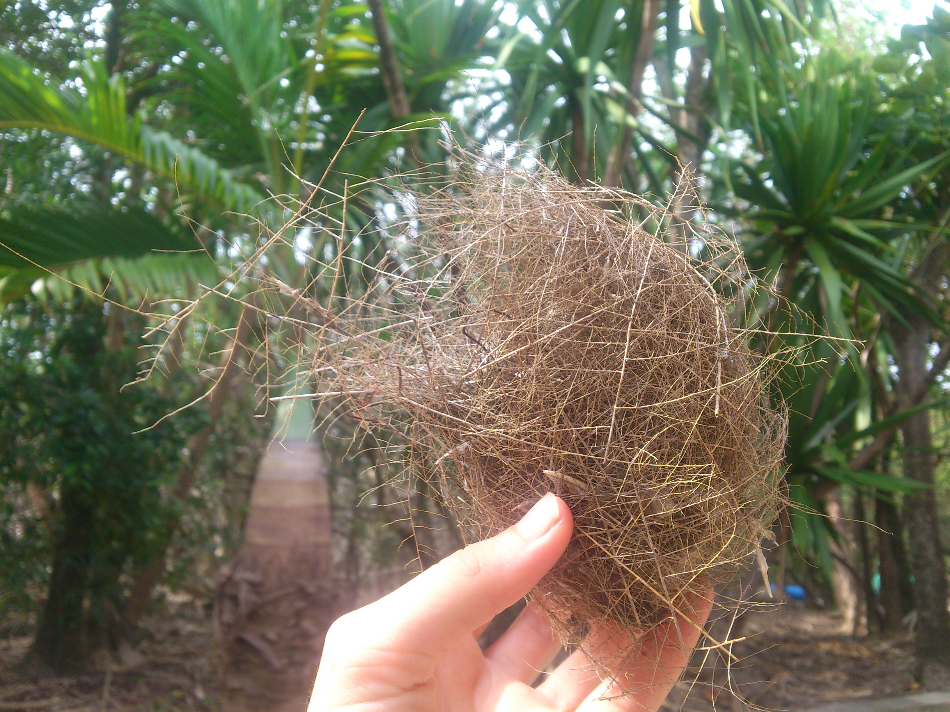 Nest des Mauritiuswebers; verlassen und nach heftigem Wind zu Boden gefallen; Fundort Île aux Aigrettes